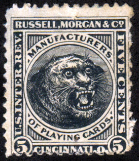 США. Марка сборов с игральных карт, 19 век